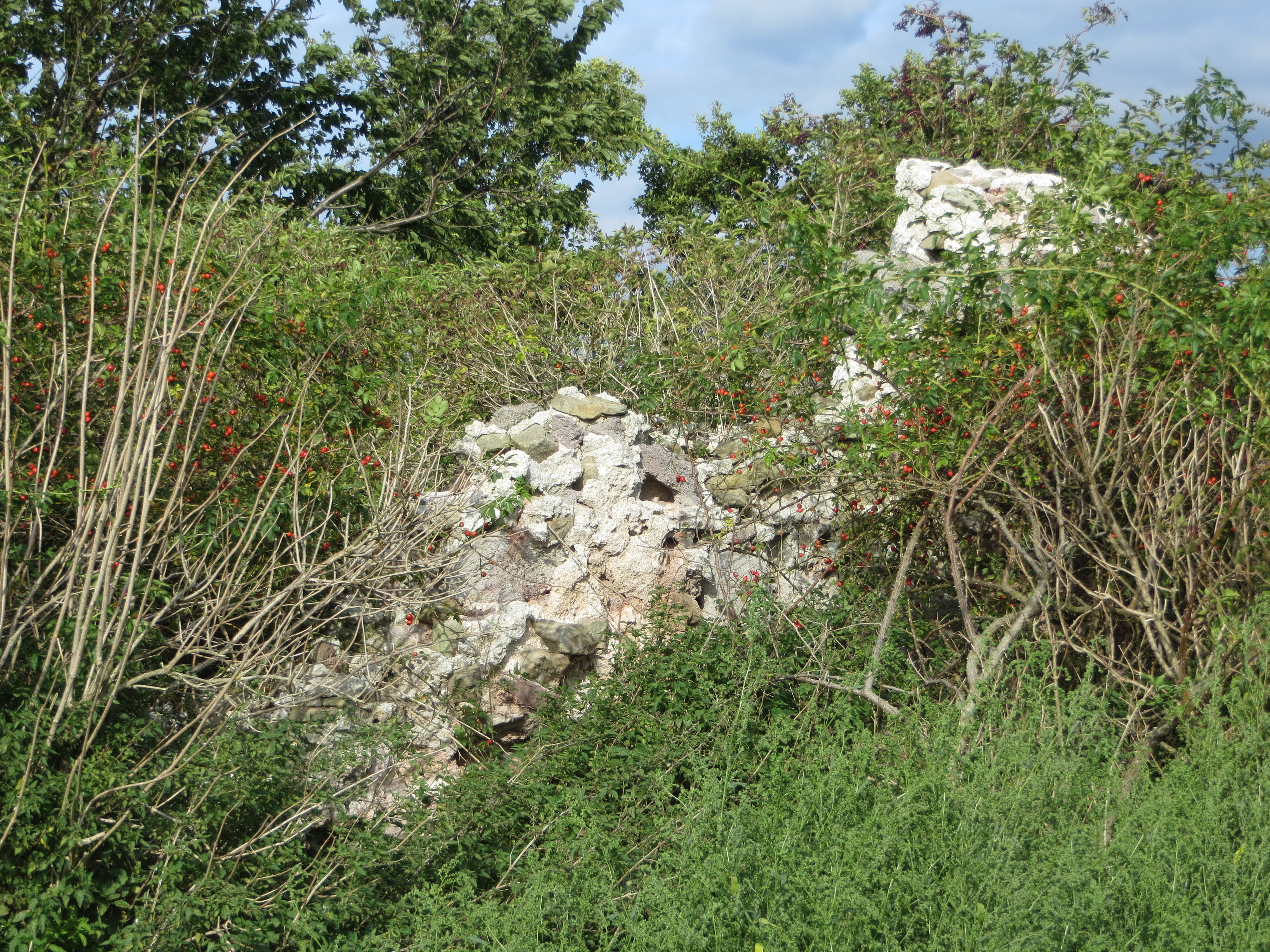 Die Wüstung Lindeschu nordöstlich von KelbraThis is a photograph of an architectural monument. 84697